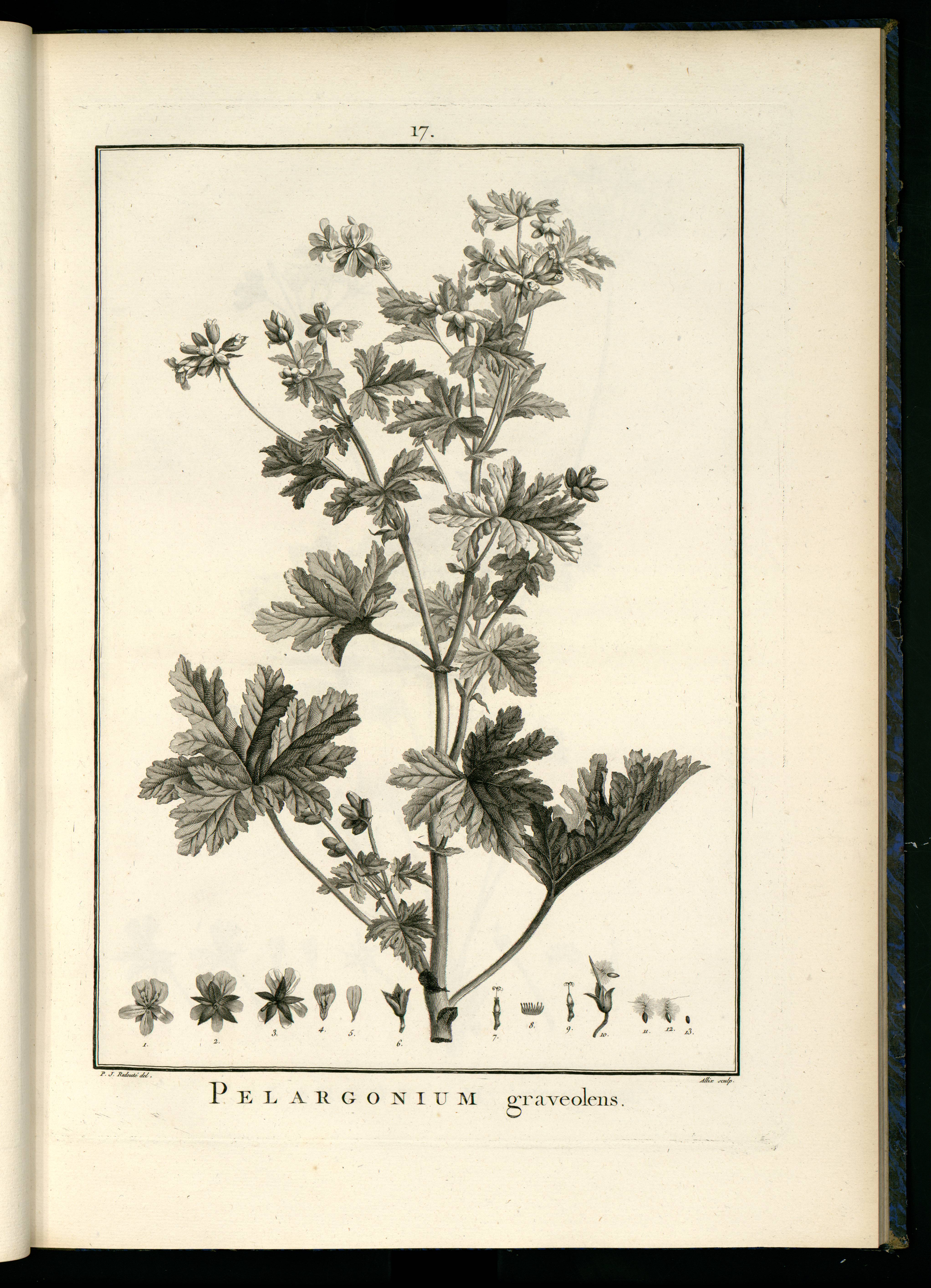 Illustration de Redouté dans Geraniologia de L'Héritier de Brutelle, 1787-1788